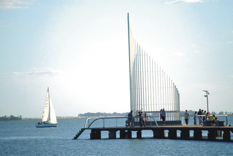 Extremo del espigón central del Parque Natural Laguna de Gómez, en Junín, Argentina. (Autor: Germán Ramos).